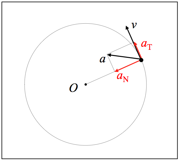 Higidura zirkularreko abiaduraren eta azelerazioaren grafikoa.